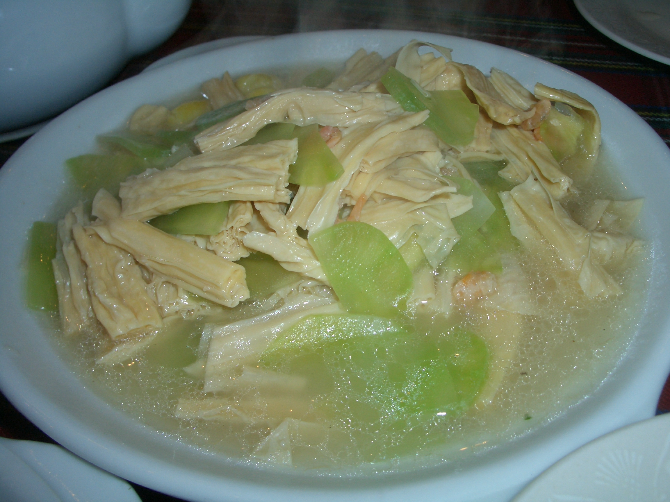 Tofu skin fu zhu